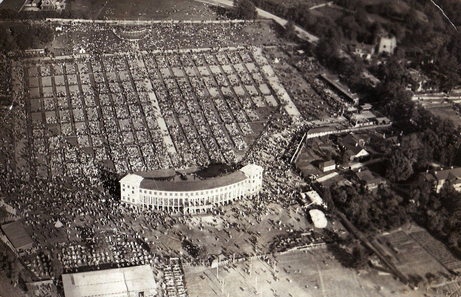 Vana Tallinna laululava.